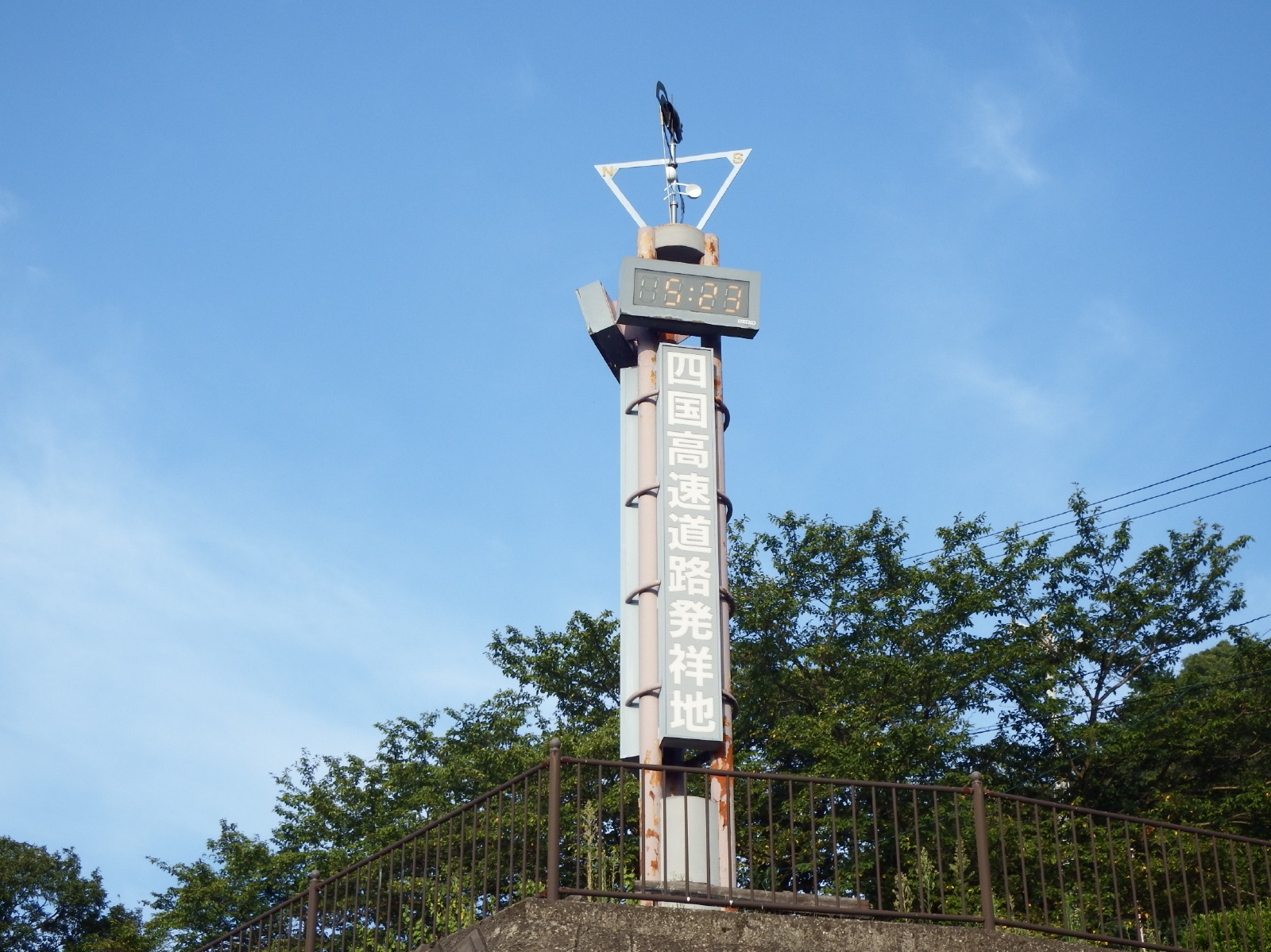 四国高速道路発祥の碑